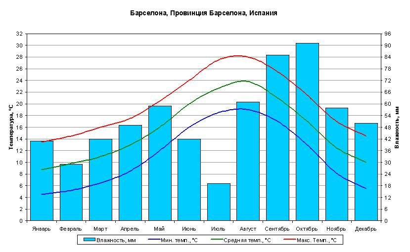 Климат БарселоныГрафик